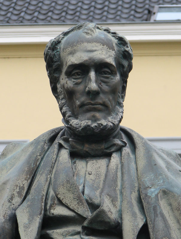 Statue d'Eugène Defacqz, centre administratif d'Ath. Photo personnelle, faite le 22 août 2006. Libre de droits